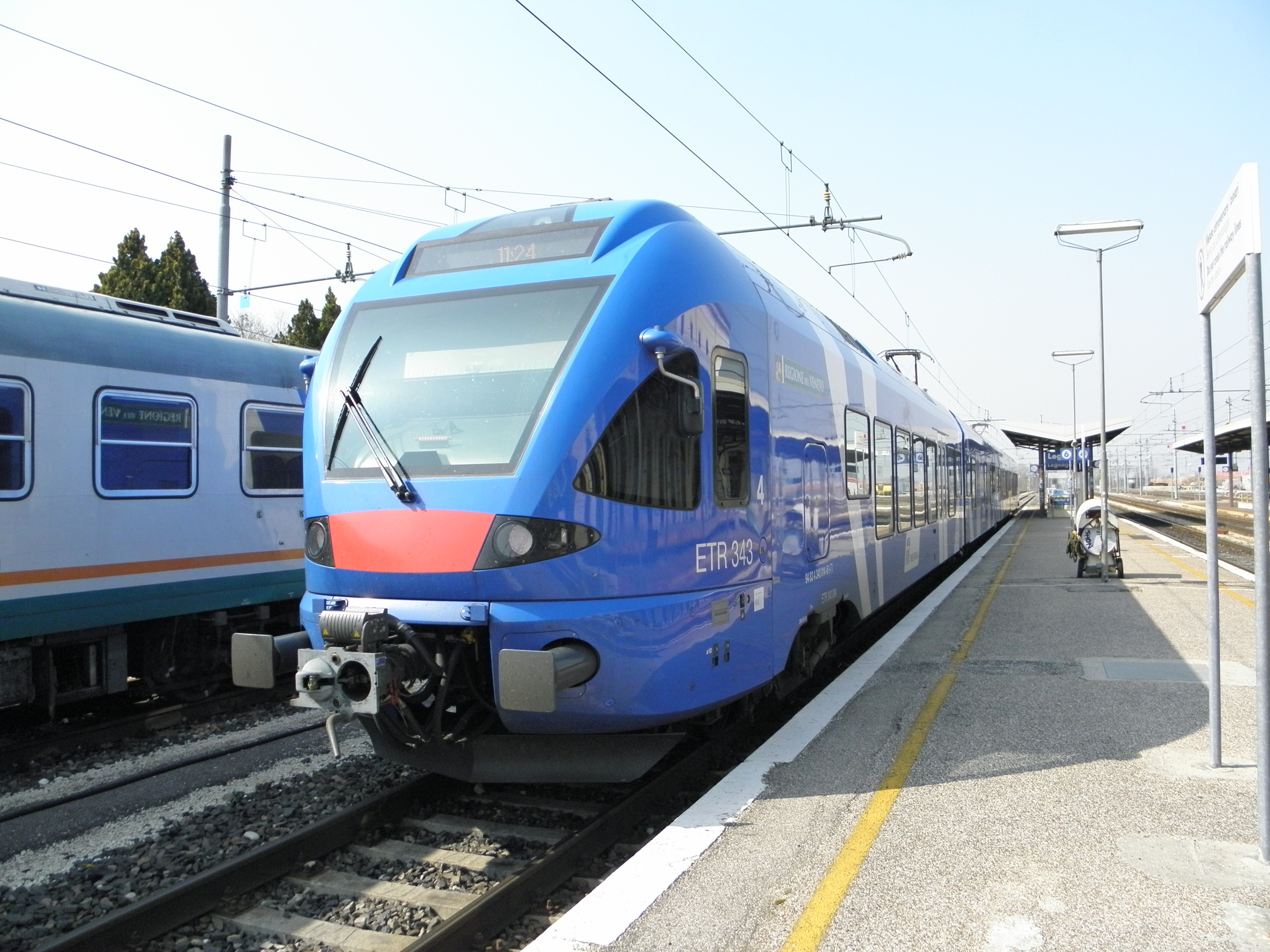 Stazione di Legnago, la FLIRT ETR 340.004 Sistemi Territoriali in sosta al binario 6.